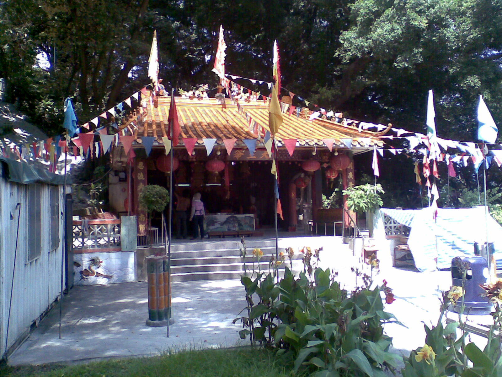 元洲仔大王爺廟